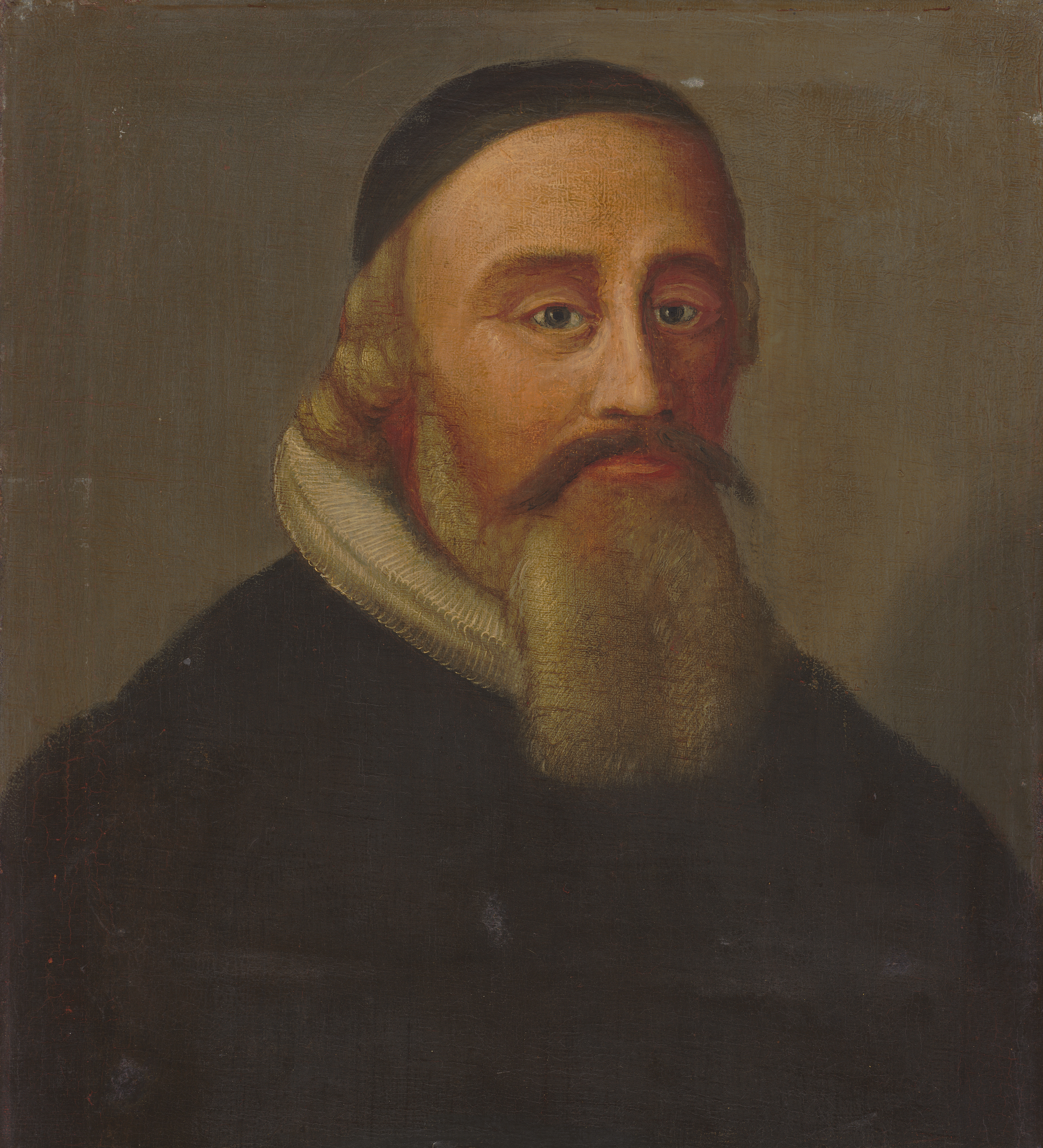 Ölgemälde des Zürcher Geistlichen Hans Caspar Waser